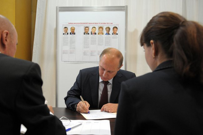 Досрочное голосование президента Владимира Путина на выборах депутатов города Москвы